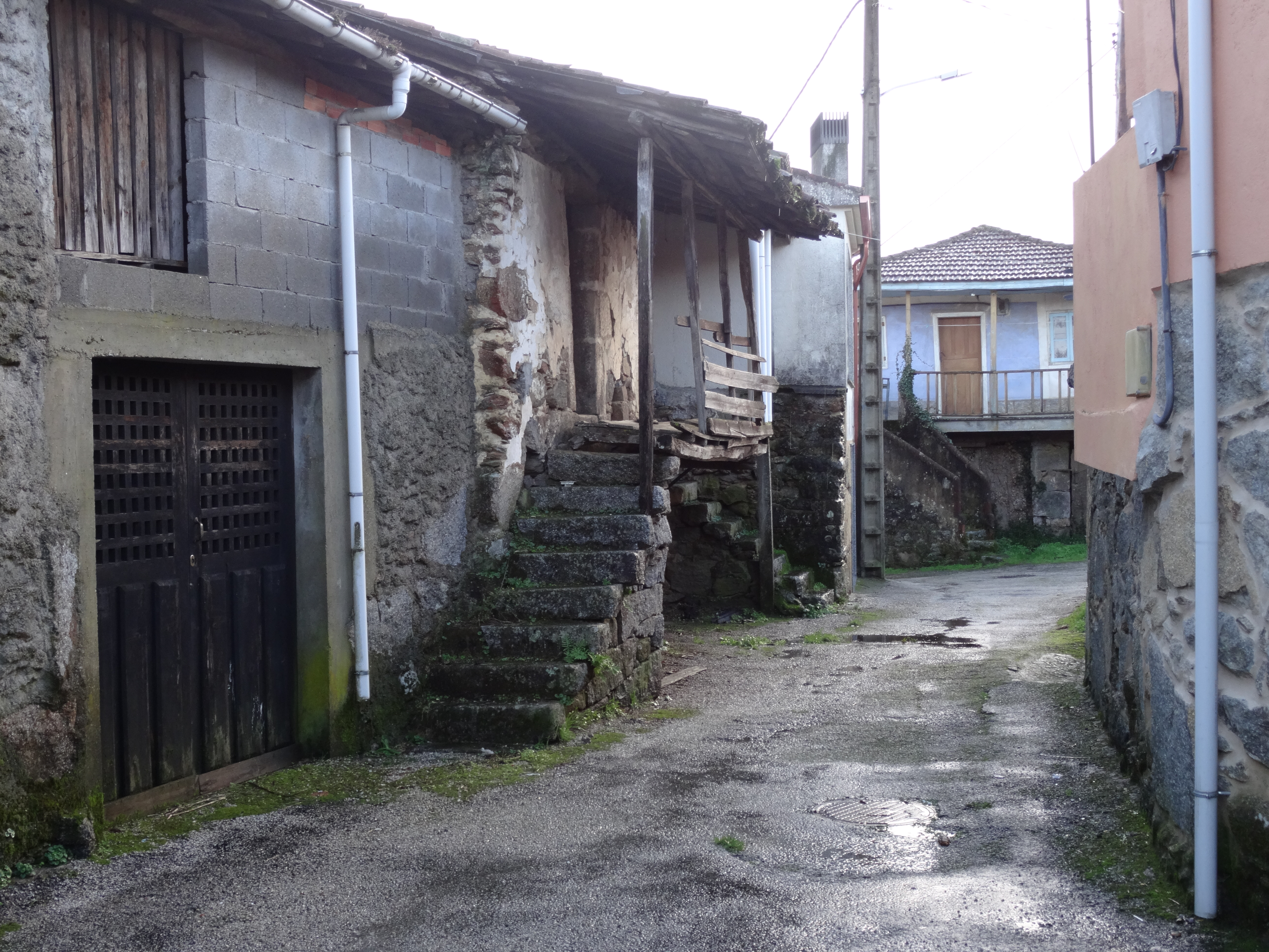 Ver título.